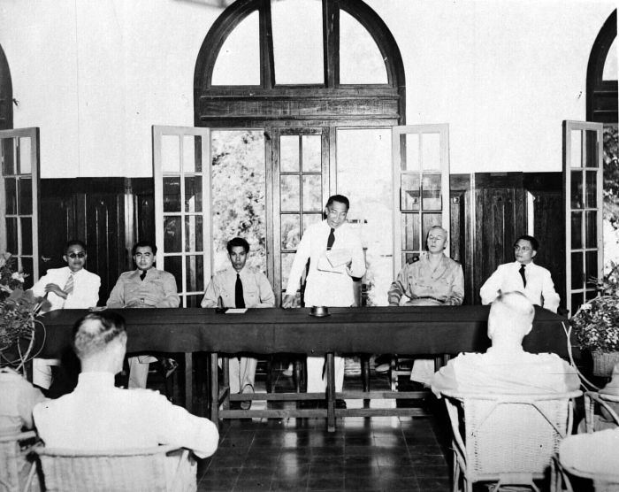 Repronegatief. De eerste Indonesische burgemeester van Makassar, Abdoel Hami, wordt geïnstalleerd door de president van Oost-Indonesië, Soekawati